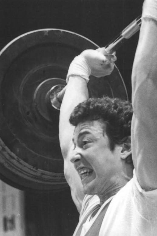 Andreas Behm ADN-ZB Hiekel 02.02.1985 Dresden: 37. DDR-Meisterschaften im Gewichtheben-Andreas Behm (Motor Stralsund) erreichte im Zweikampf eine Leistung von 342,5 kg und wurde DDR-Meister in der Klasse bis 67,5 kg. In der All-Kategorien-Wertung belegt er vorerst Platz 1, da er bis auf 10 kg an den bestehenden Weltrekord herankam.